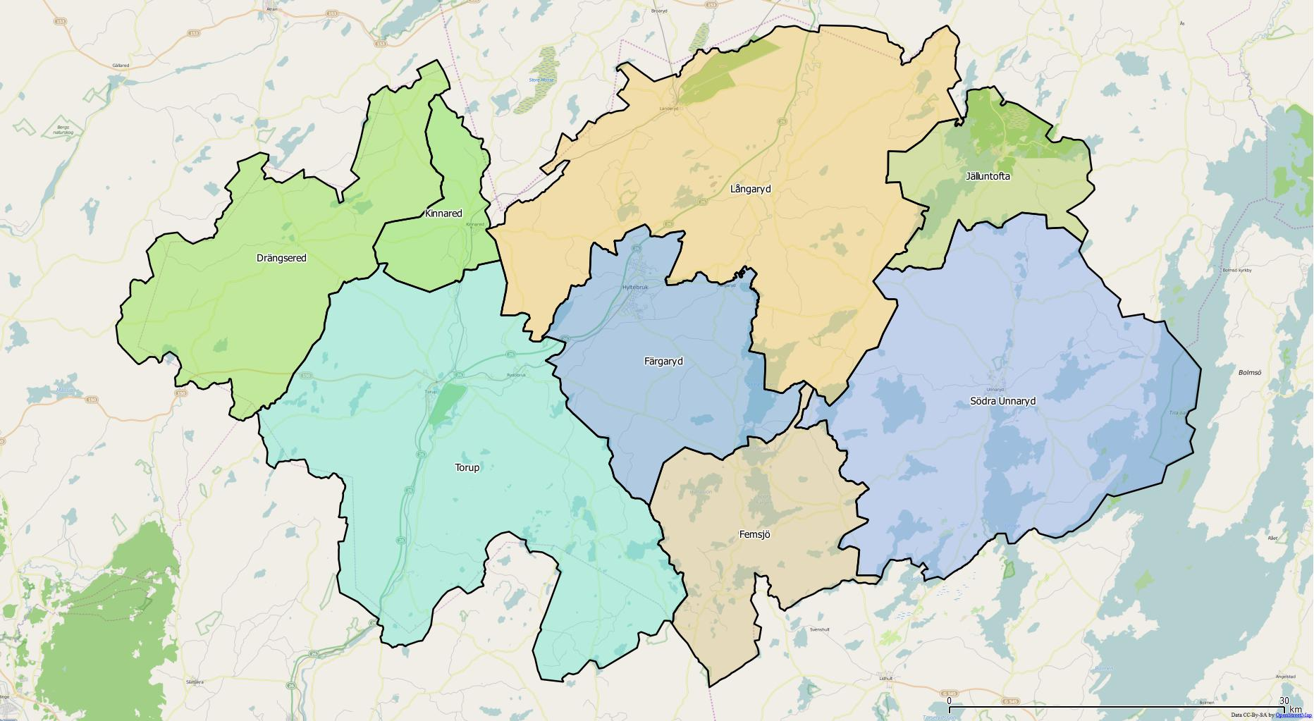 Distriktsindelningen i Hylte kommun